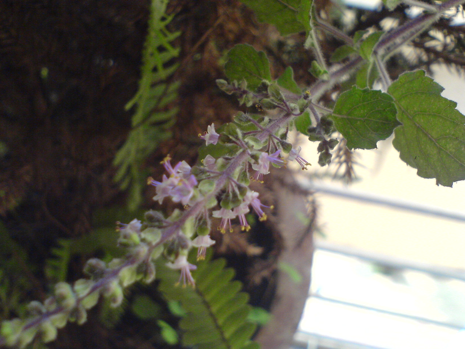 Lamiaceae (mint family) » Ocimum tenuiflorum OSS-ih-mum -- from the Greek word meaning to smell, to be fragrant ten-yoo-ee-FLOR-um -- meaning, slender flowered SANK-tum -- meaning sacred commonly known as: holy basil, sacred basil • Assamese: ভুলসী tulasi • Bengali: তুলসী tulasi • Gujarati: તુલસી tulsi, વૃંદા vrinda • Hindi: बृन्दा brinda, कठिंजर kathinjar, पर्णासी parnasi, पत्रपुष्प patra-pushp, पवित्रा pavitra, शिवालय sivalay, तुलसी tulasi, वैष्णवी vaishnavi, विष्णुवल्लभ vishnu-vallabha, वृन्दा vrinda • Kannada: ತುಳಸಿ tulasi, ವಿಷ್ಣು ತುಳಸಿ vishnu tulasi • Konkani: तुळशी tulashi • Malayalam: തുളസി thulasi • Marathi: तुळशी tulshi, तुळस tulas • Nepalese: तुलसि tulasi • Oriya: tulasi • Sanskrit: गौरी gauri, मालूकः malukah, मञ्जरीकः manjirikah, पापघ्नी papaghni, पापनाशिनी papanashini, सुरस surasa, तुलसी tulasi, वैष्णवी vaishnavi, विष्णुप्रिय vishnupriya • Tamil: சூரியகரந்தை curiya-karantai,துளசி tulasi, துழாய் tuzay • Telugu: బృంద brinda, కుక్కపాల kukka-pala, తులసి tulsi • Urdu: تلسي tulasi Native to: India, Sri Lanka, Indonesia, Malaysia, Philippines; naturalized elsewhere References: Flowers of India • NPGS / GRIN • Wikipedia • Dave's Garden • Top Tropicals